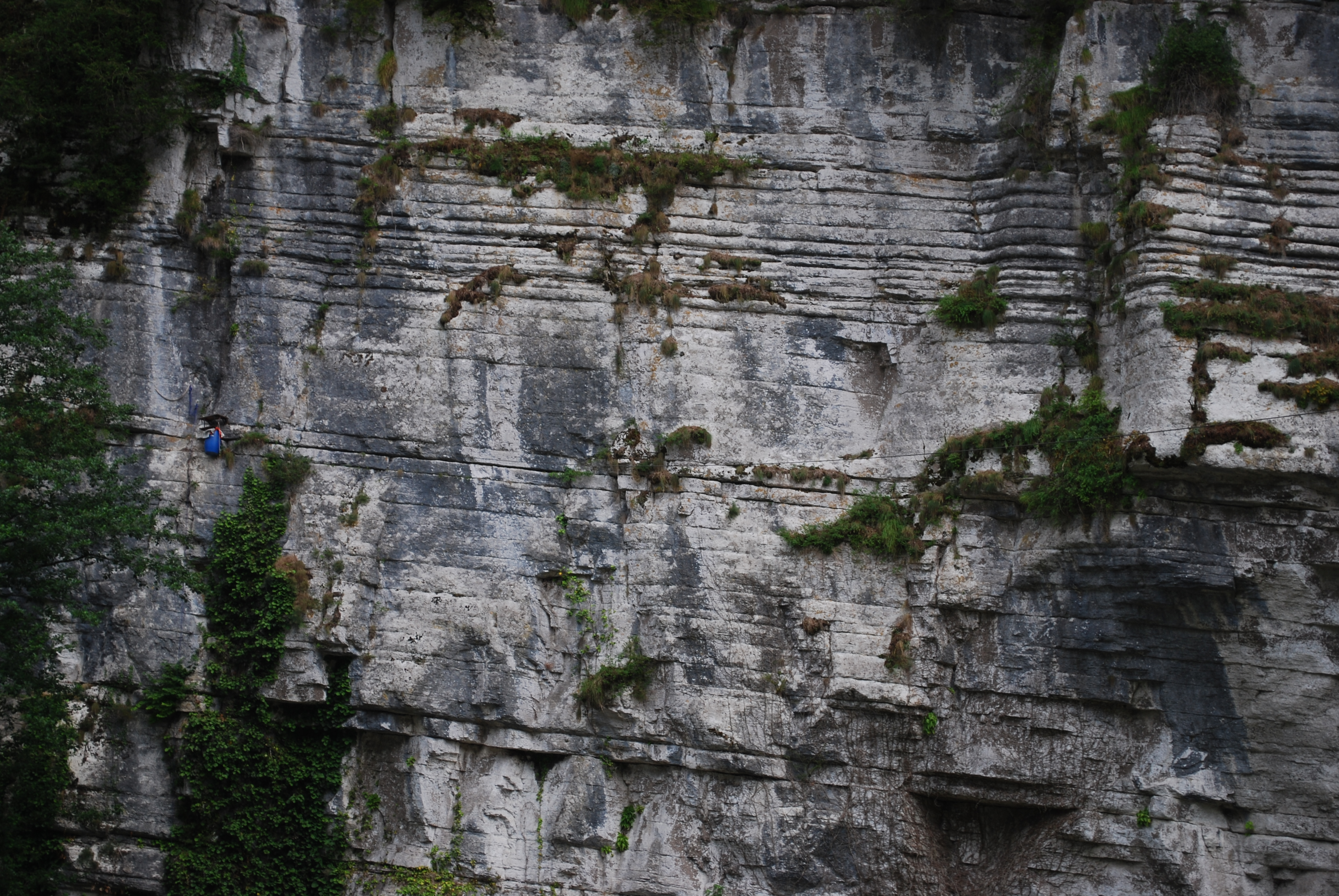 Ущелье Ахцу, Сочи This image is related to the protected area of Russia number 2310346